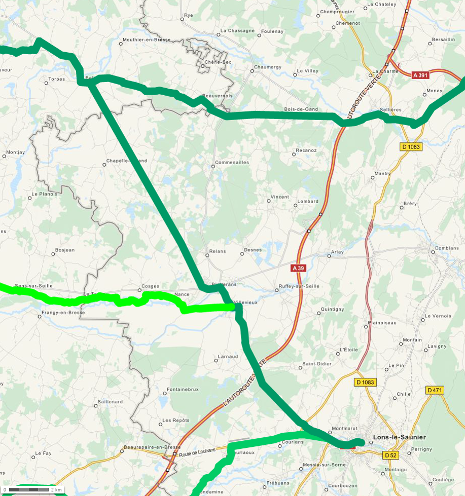 Karte der Römerstrasse von Bellevesvre nach Lons-le-Saunier Carte de la voie romaine de Bellevesvre à Lons-le-Saunier This map may be incomplete, and may contain errors. Don't rely solely on it for navigation.